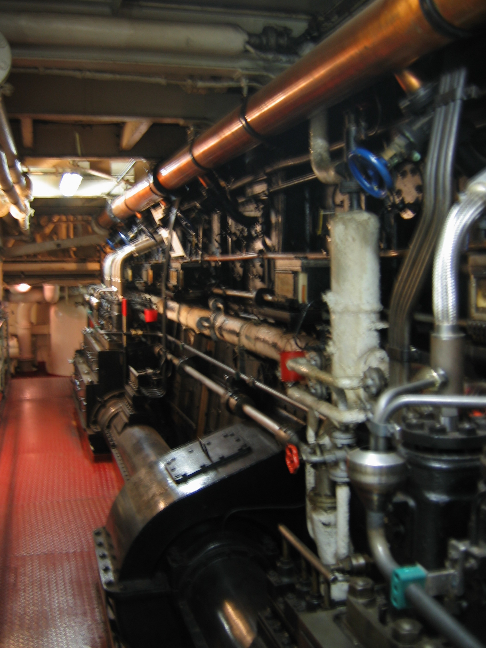 Drobnicowiec, lata 60-te. Silnik główny drobnicowca MS Cap Sant Diego port Hamburg